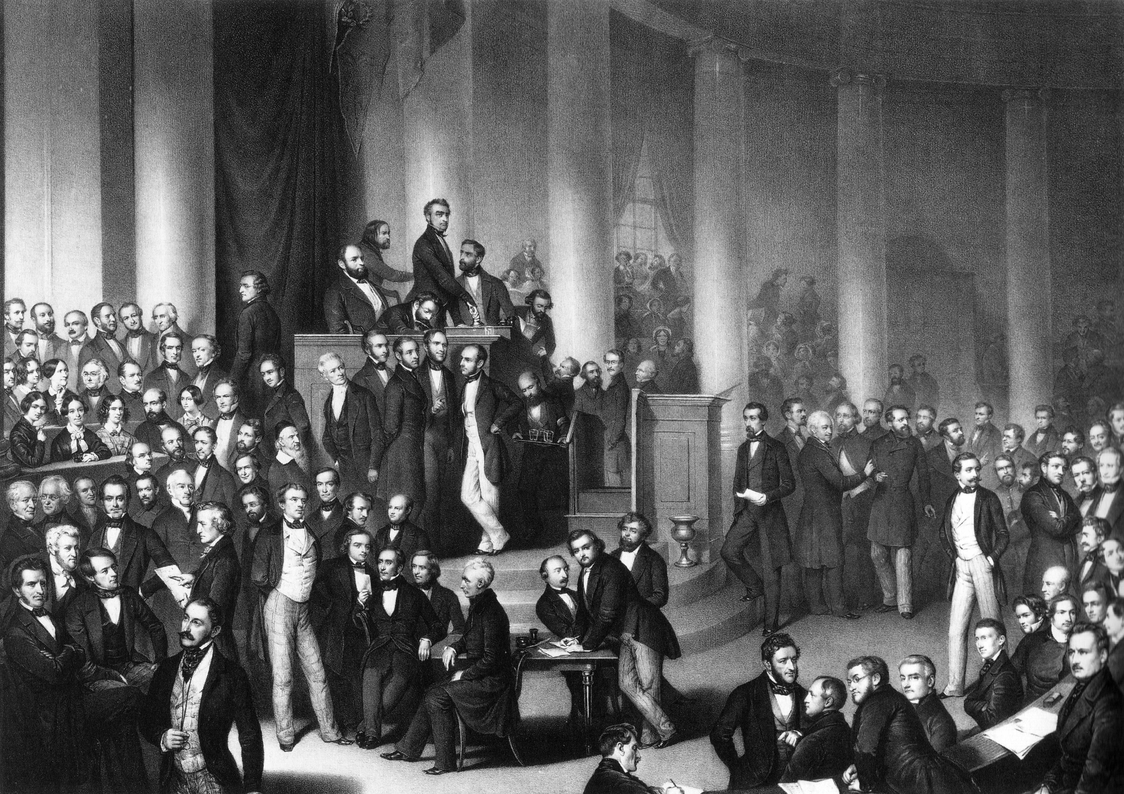 Lithographie, Eduard Meyer, 1848. “Die Deutsche Nationalversammlung in der Paulskirche”.